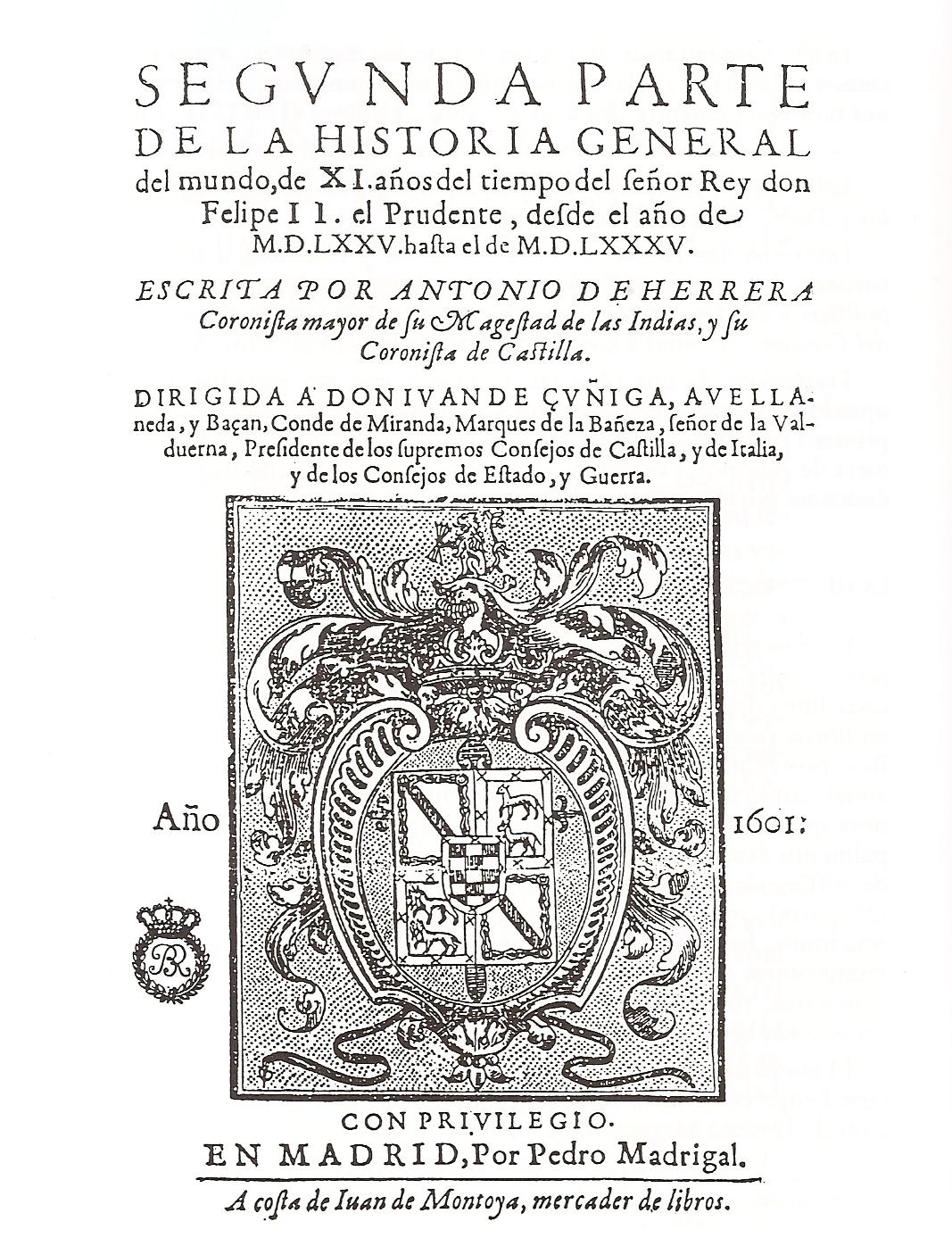 Portada de la segunda parte de la Historia general del Mundo, escrita por Antonio de Herrera y Tordesillas, Cronista Mayor de Castilla y de Indias.